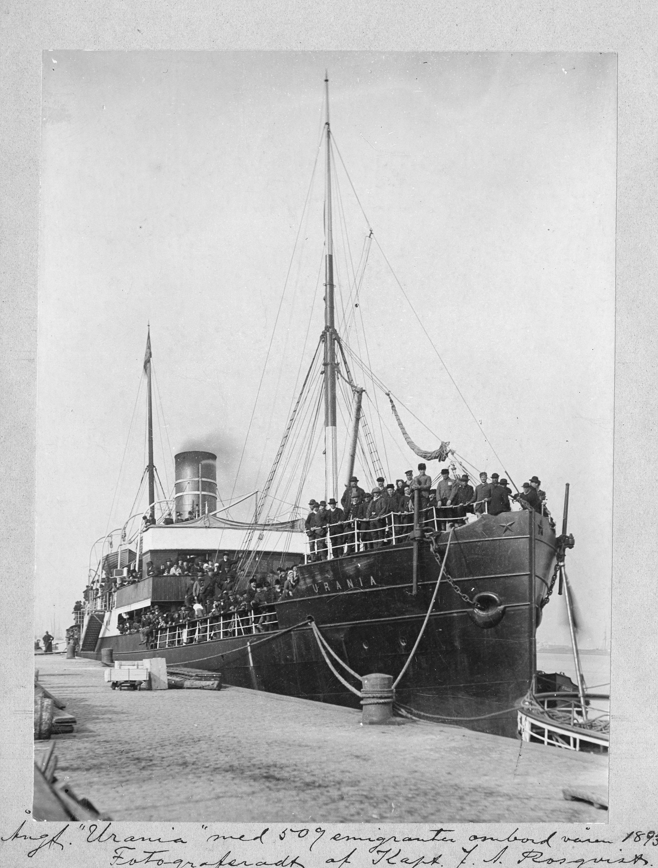 s/s Urania satamassa. Kyydissä 509 siirtolaista. 200627_2155